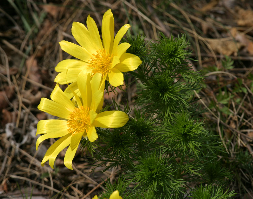 Adonis vernalis (Frühlings-Adonisröschen), Ranunculaceae (Hahnenfußgewächse), im Lennebergwald